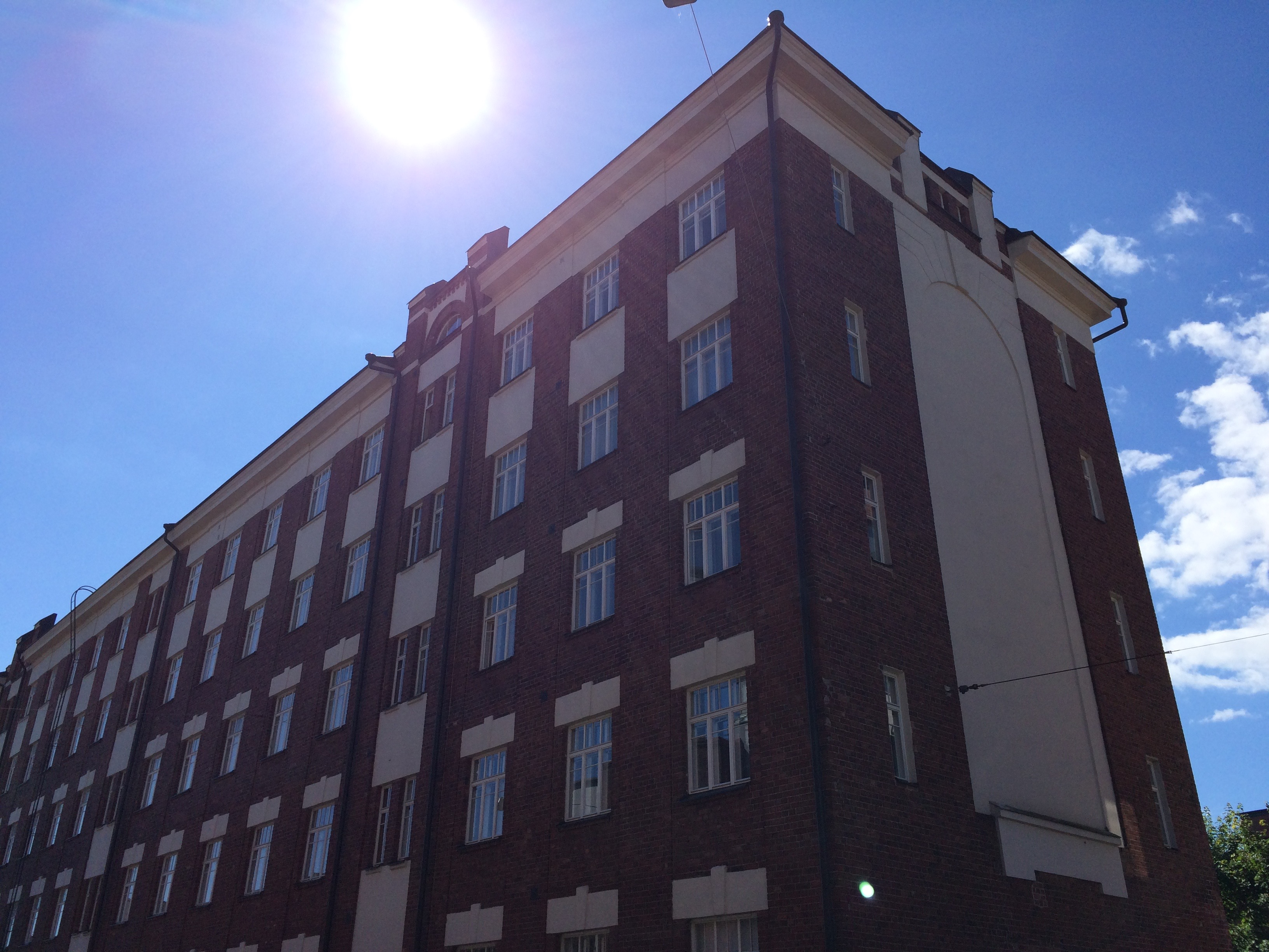 Lutikkalinna-rakennus Helsingin Katajanokalla.